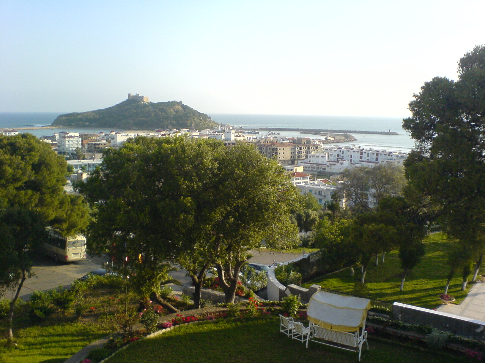 View of Tabarka, Tunisia